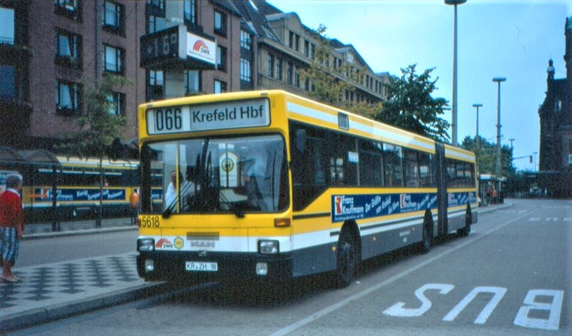 Krefeld, Bus 5618, MAN SG 242 H, am Hauptbahnhof